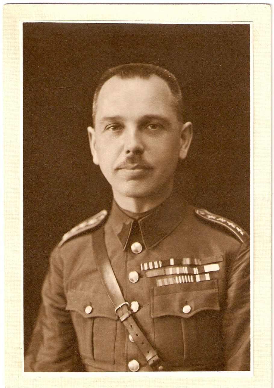 Plukovník Ing. František Balátě